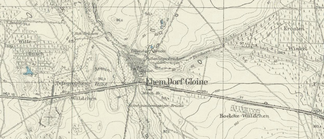 Ausschnitt von Gloine aus dem Messtischblatt Nr. 2104 (Altengrabow), 1:25.000 (Aufn. 1900, bericht. 1927.)